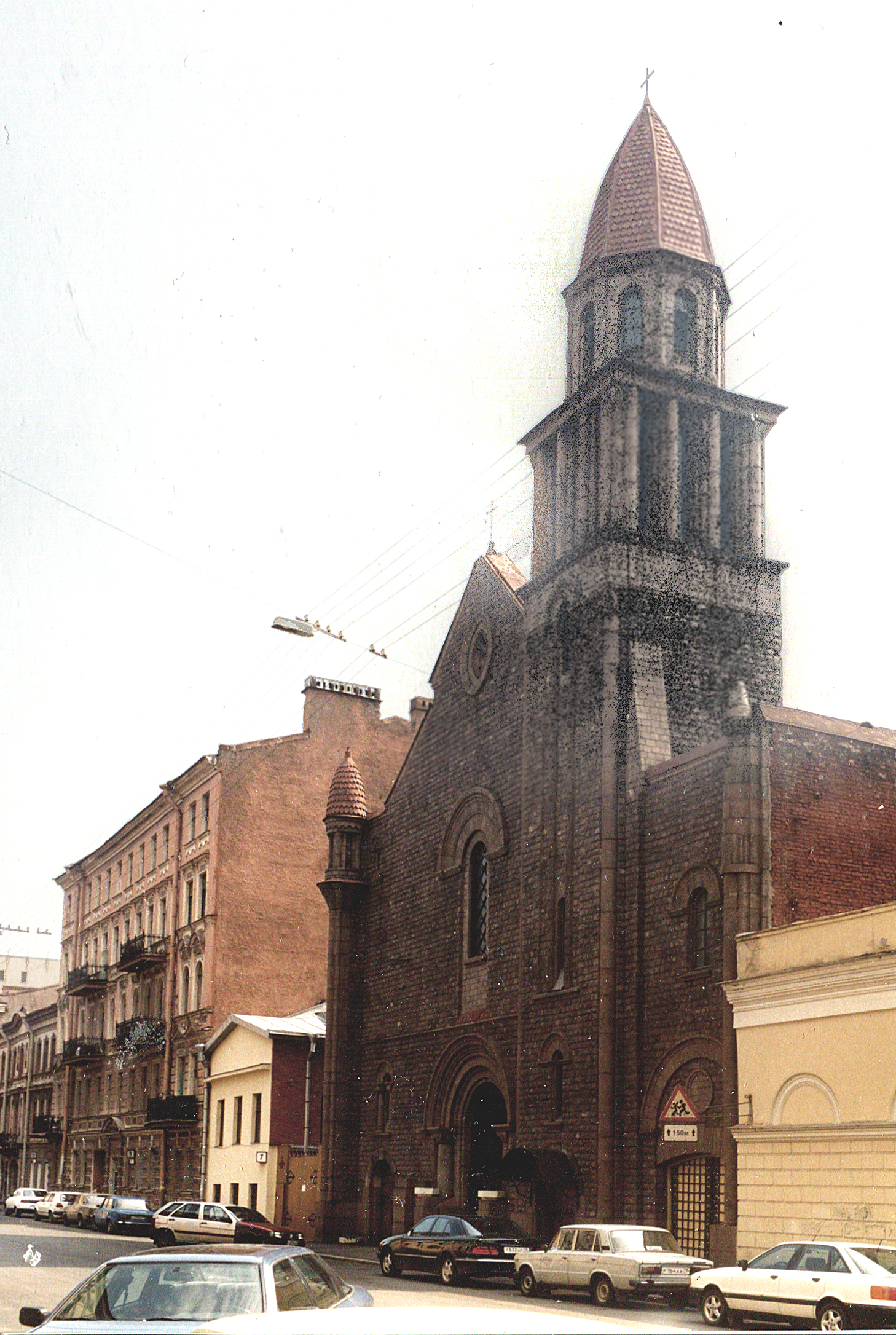 Церковь французского посольства.